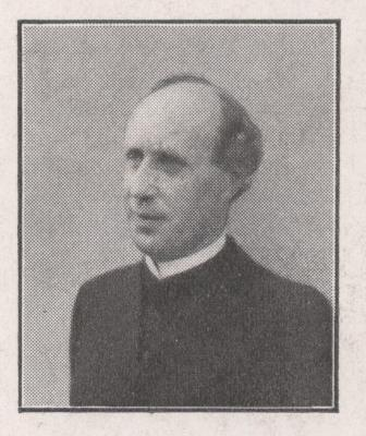 Dr. Jakob Bisson, Priester, Historiker, Speyer